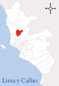 Localización del Distrito de Comas Imagen elaborada por --Edgardo Reyes 20:18 9 mar, 2005 (CET) Categoría:Mapas del Perú (imagen)